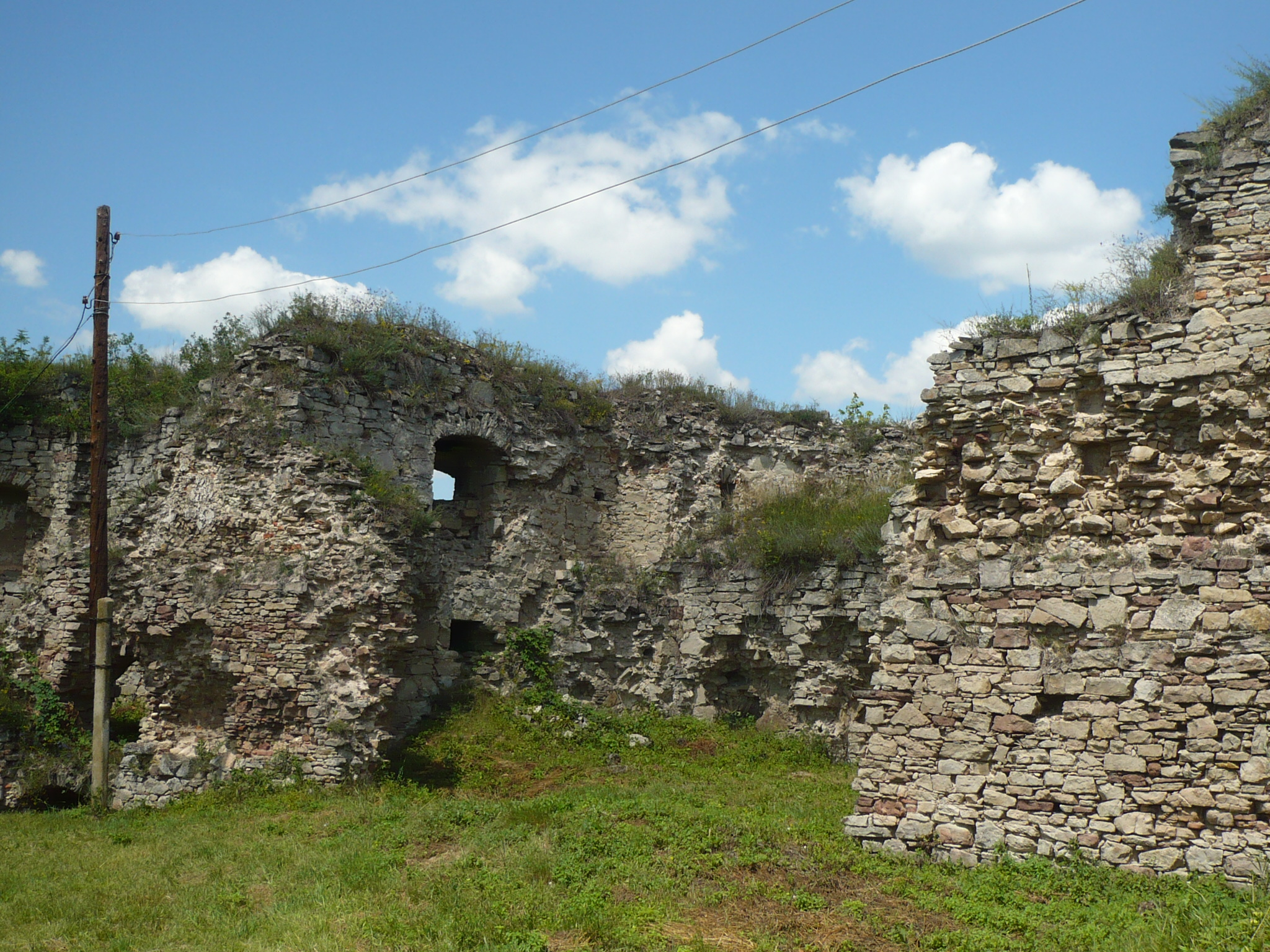 Jazłowiec. Zamek